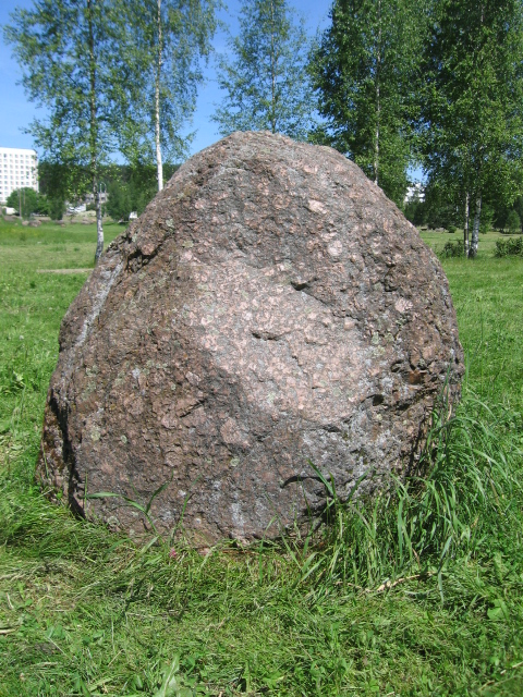 Валун "Дед". Минск, музей валунов